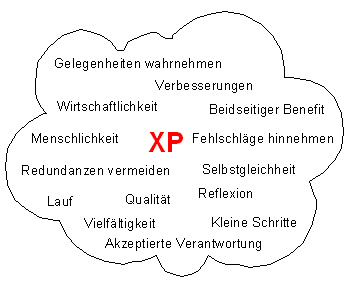 XP-Evolution-Prinzipien